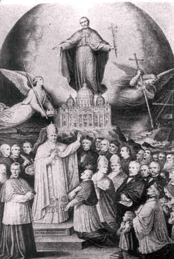 Johann Schmitt, St. Joseph, Patron der Kirche, Convington Kentucky